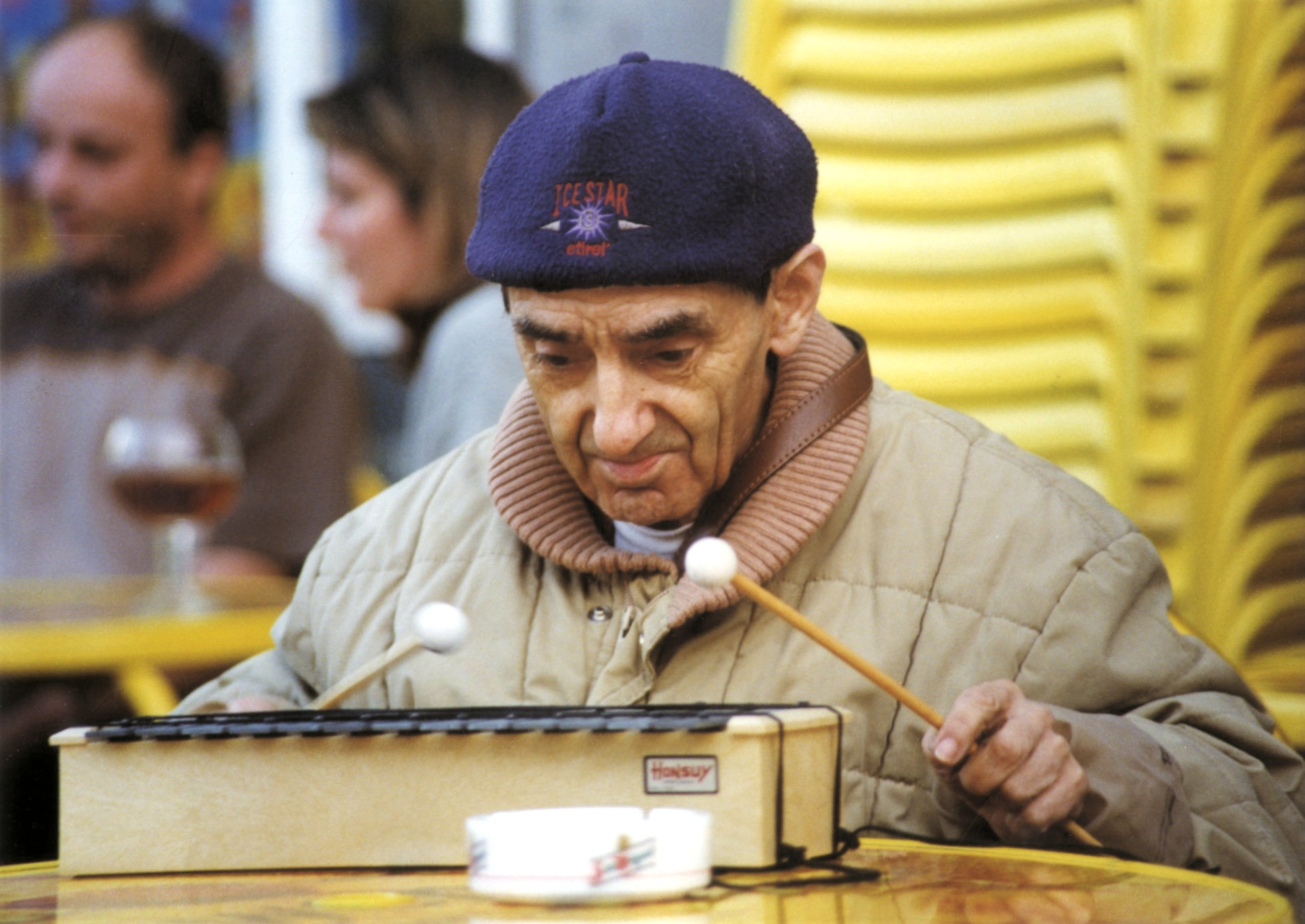 Txantxillo, pertsonaia donostiar herrikoia.